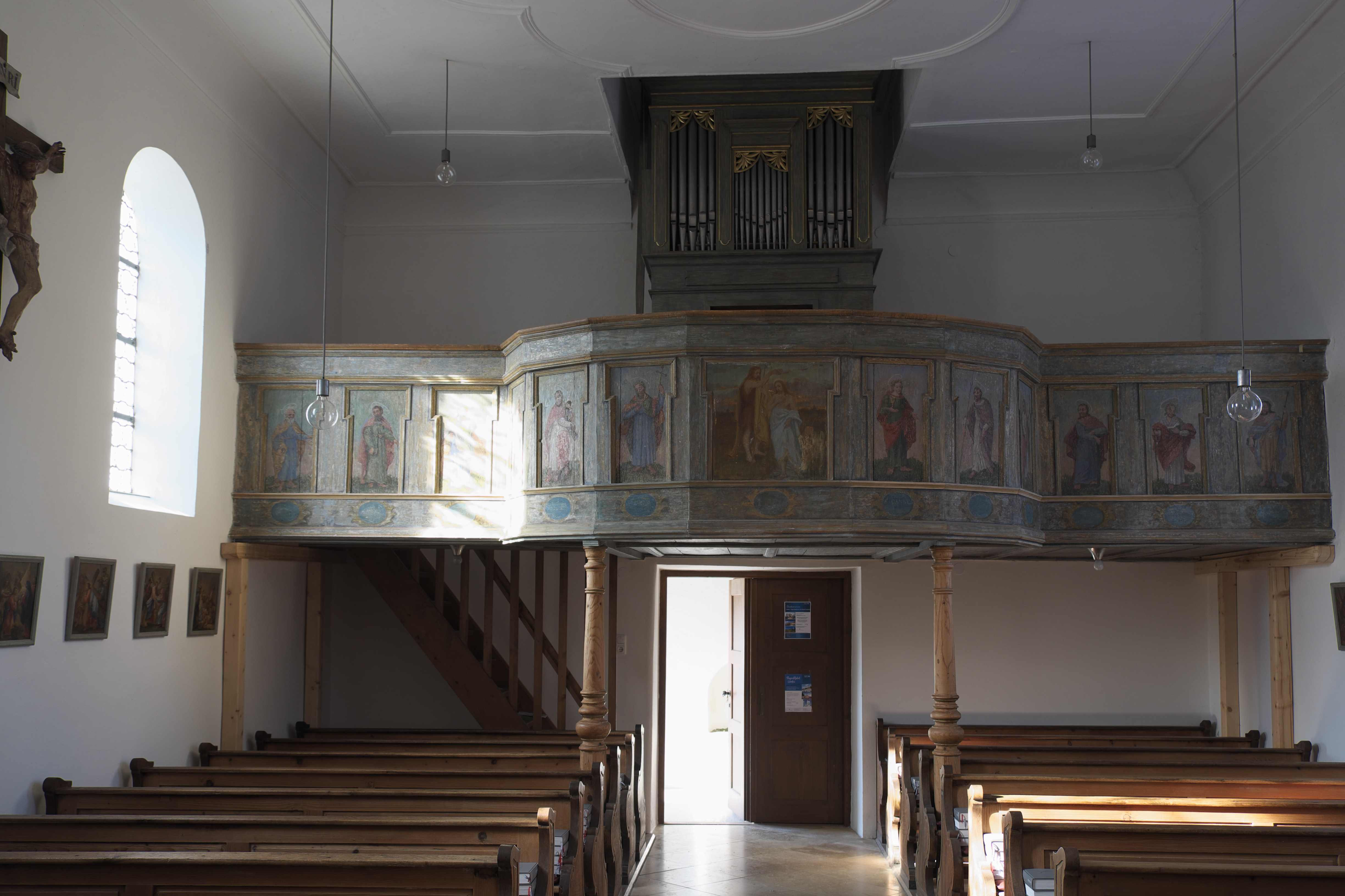 Alte katholische Pfarrkirche St. Johannes der Täufer in Breitbrunn am Ammersee (Herrsching am Ammersee) im Landkreis Starnberg (Bayern/Deutschland), Empore um 1700, mit Darstellung der Taufe Jesu und der Apostel